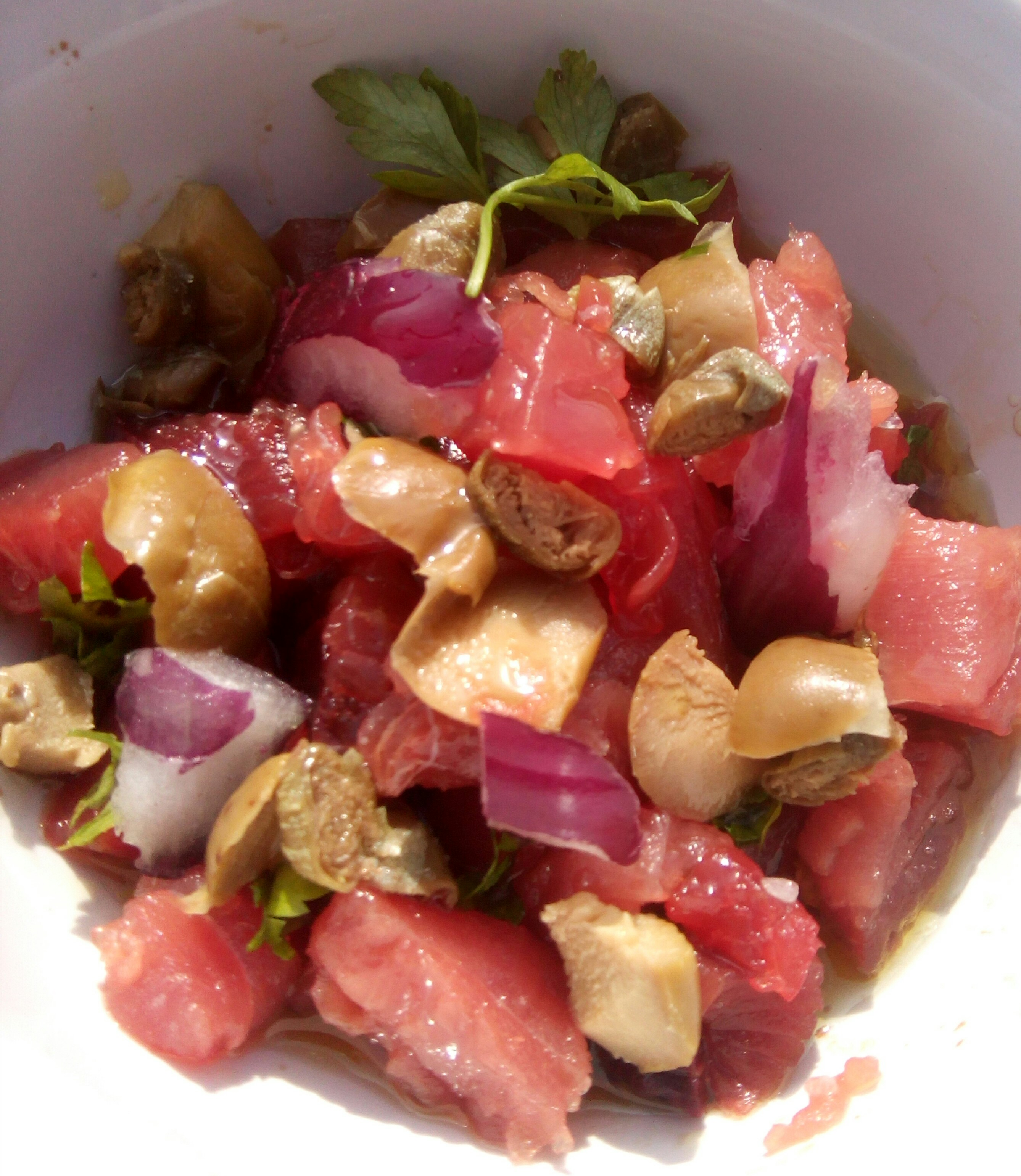 Tartare di tonno rosso di Favignana in ciotola (tonno, capperi, olive verdi, cipolla rossa, prezzemolo, olio, sale, pepe e aceto balsamico)